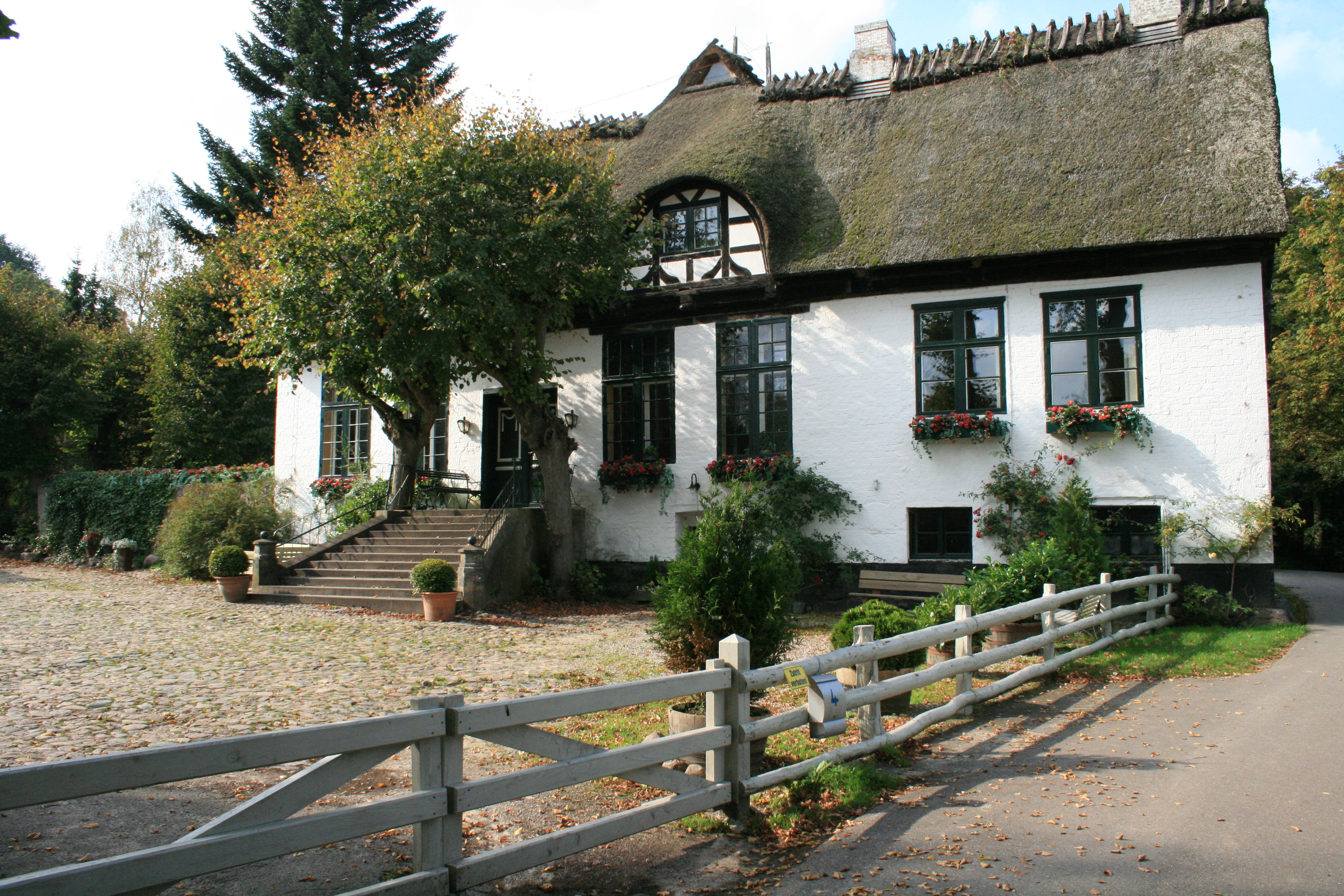 Wohnhaus und Praxis des „Landarztes“